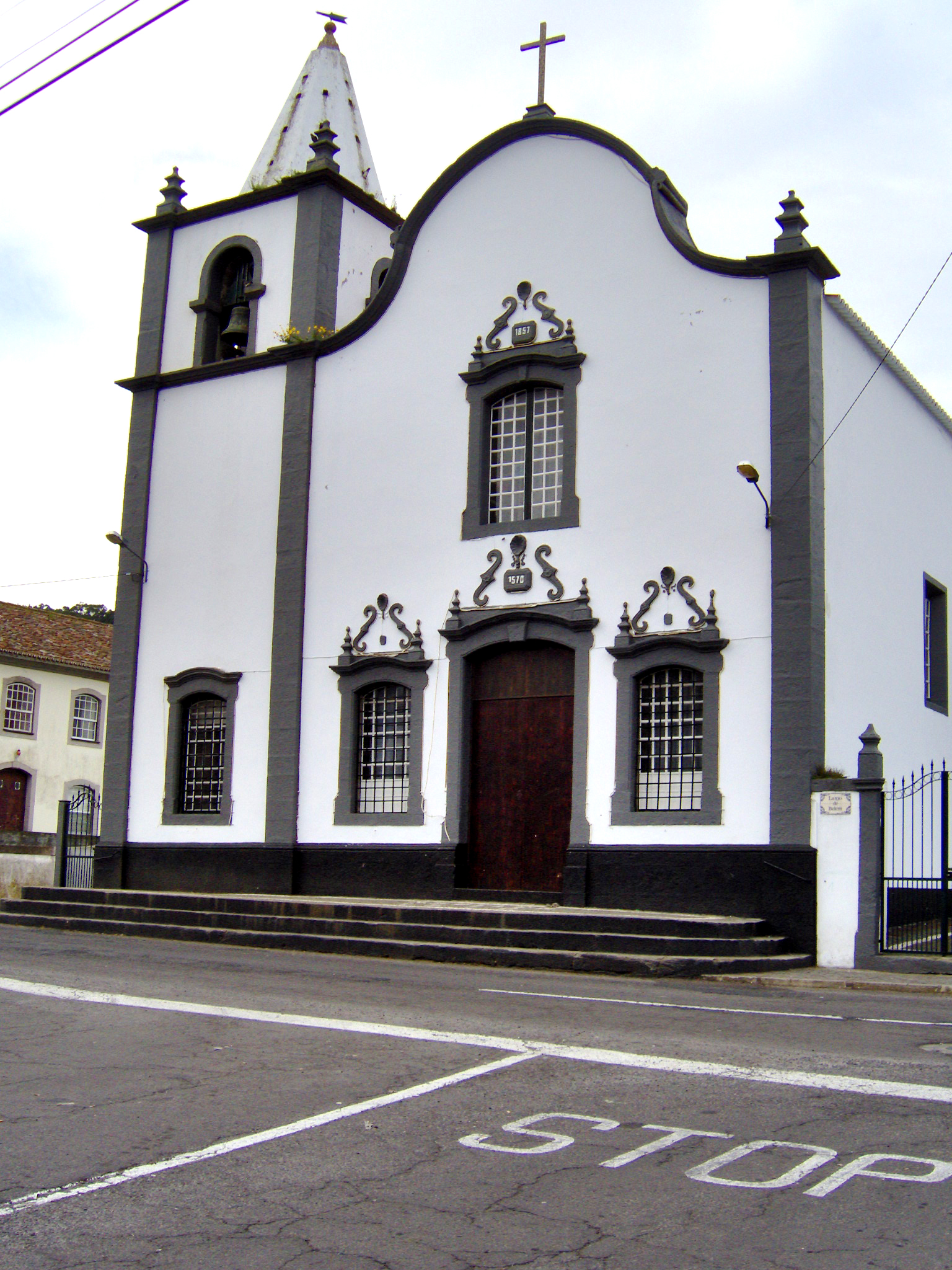 Church of Our Lady of Betheleham, civil parish of Terra Chã, municipality of Angra do Heroísmo, Terceira (Azores), Portugal